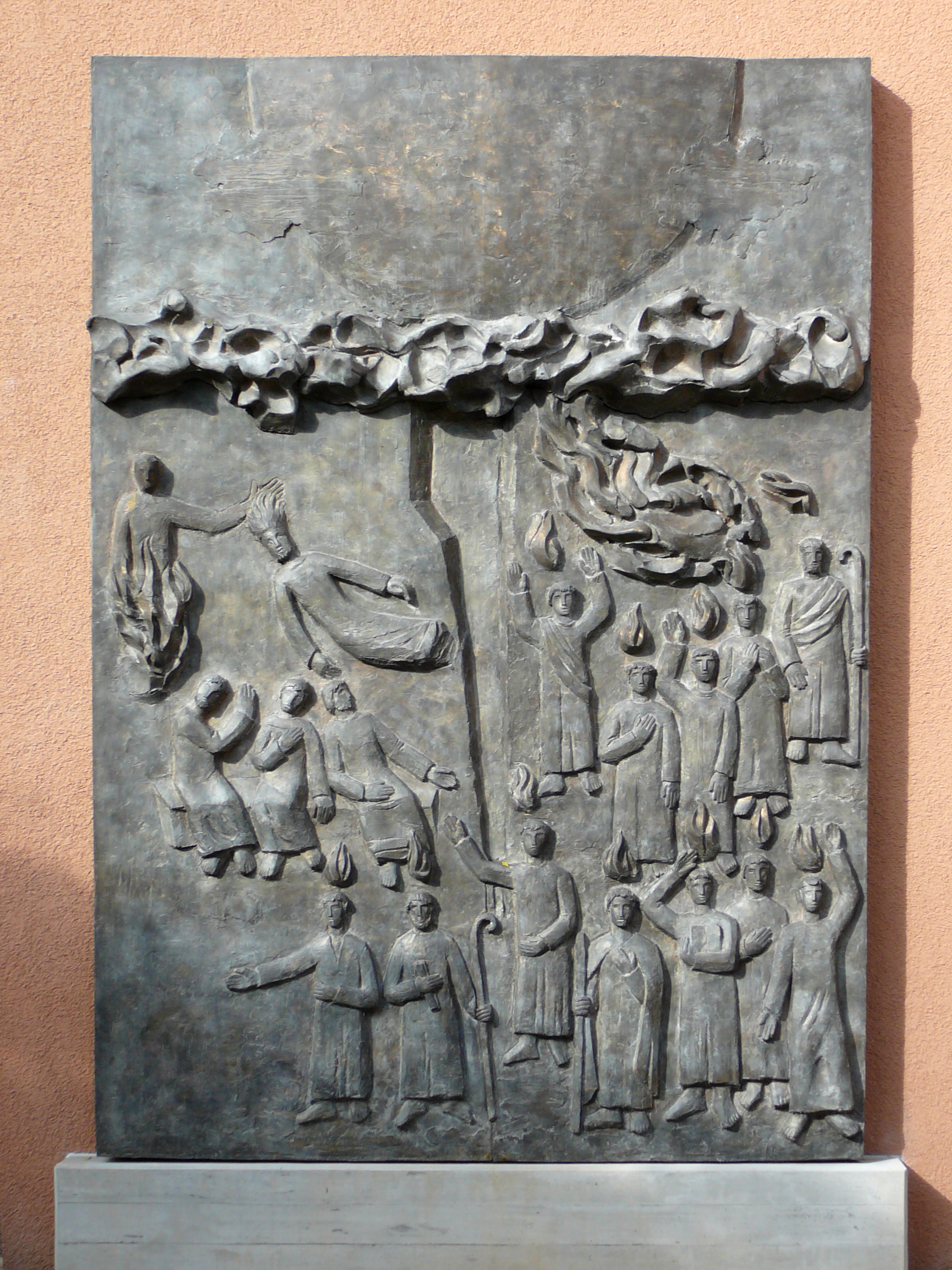 Römisch-katholische Pfarrkirche Heilig Geist Zürich-Höngg, Heilig -Geist-Relief von Hans Loretan